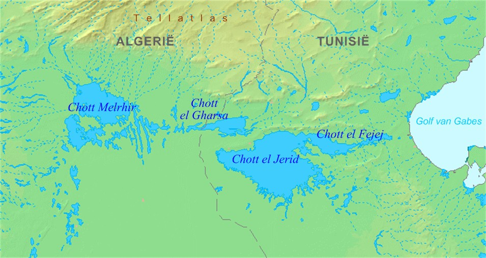 'n Kaart van Chott el Jerid in Tunisië.